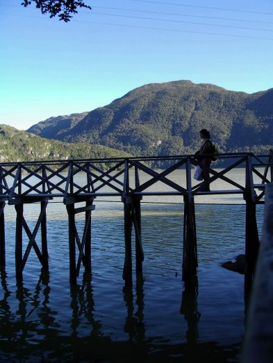 Pasarela en Caleta Tortel